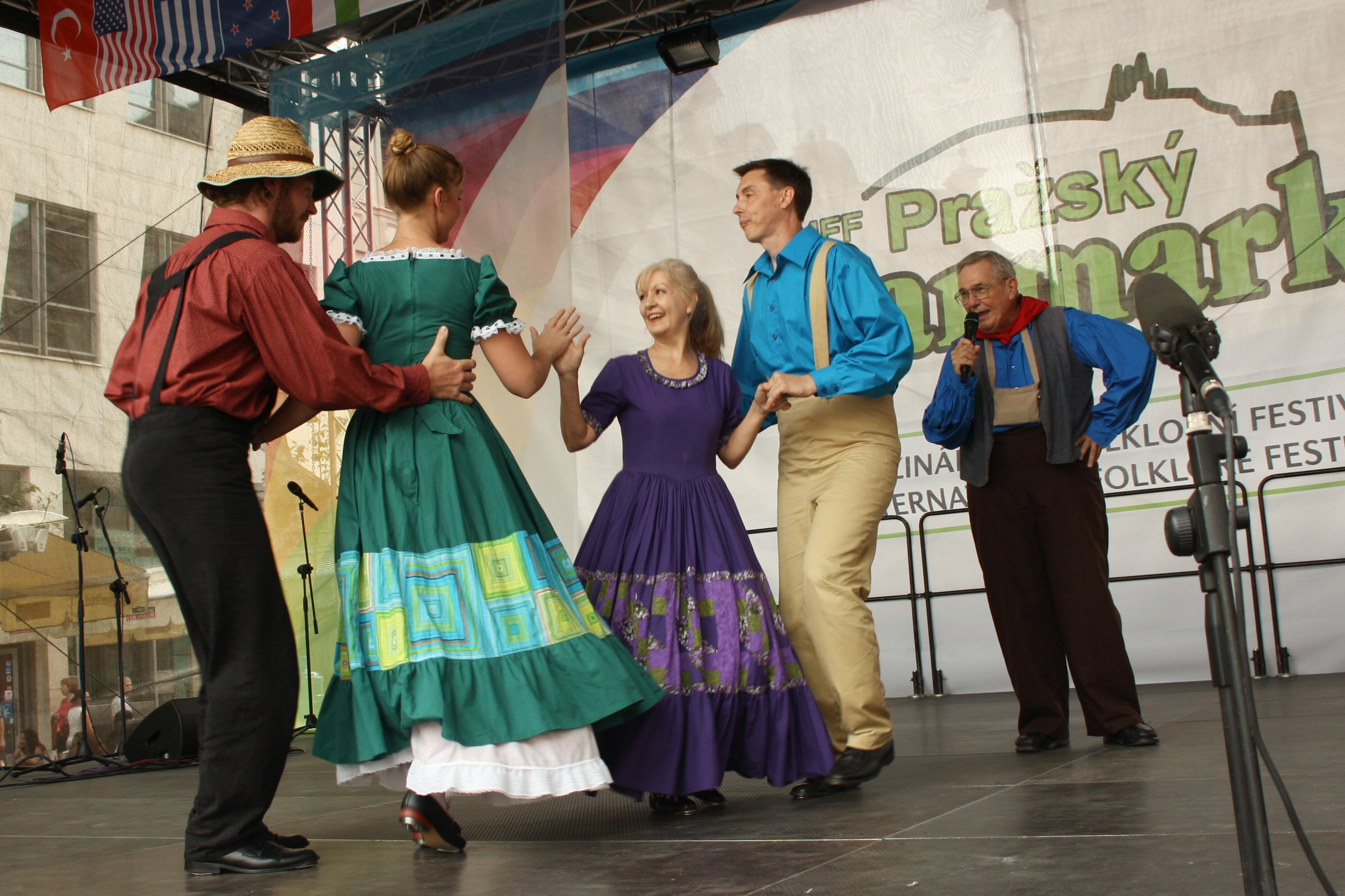 7. mezinárodní folklórní festival Pražský jarmark - Rutherford County's Cripple Creek Cloggers (USA) This photograph was taken with a DSLR from WMCZ's Camera grant.